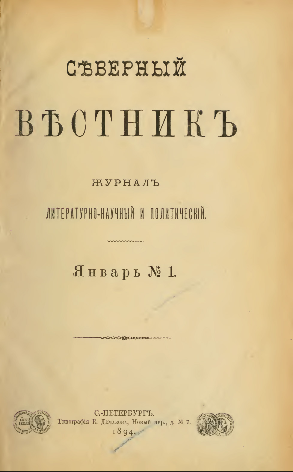 Титульный лист журнала Северный вестник (№1 за 1894 год)